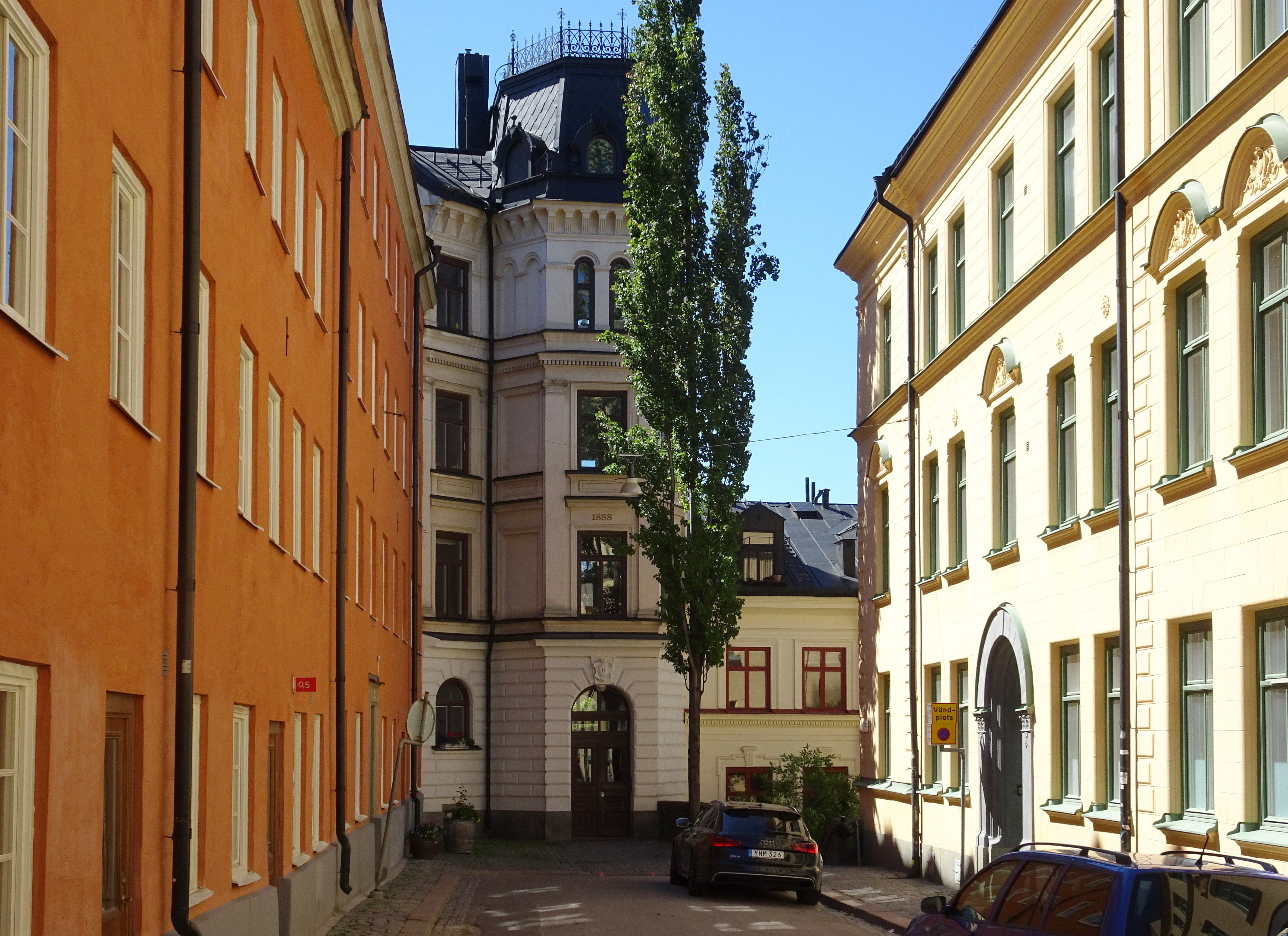 Fredmansgatan västerut med Fredmansgatan 11 (rkt fram) och Fredmansgatan 6 (t.h.)